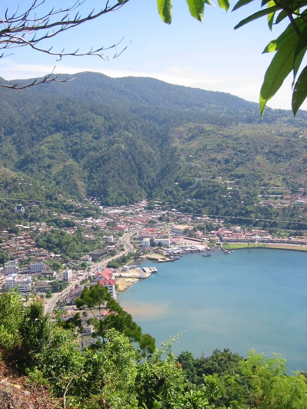 Blick auf Jayapura mit Bucht